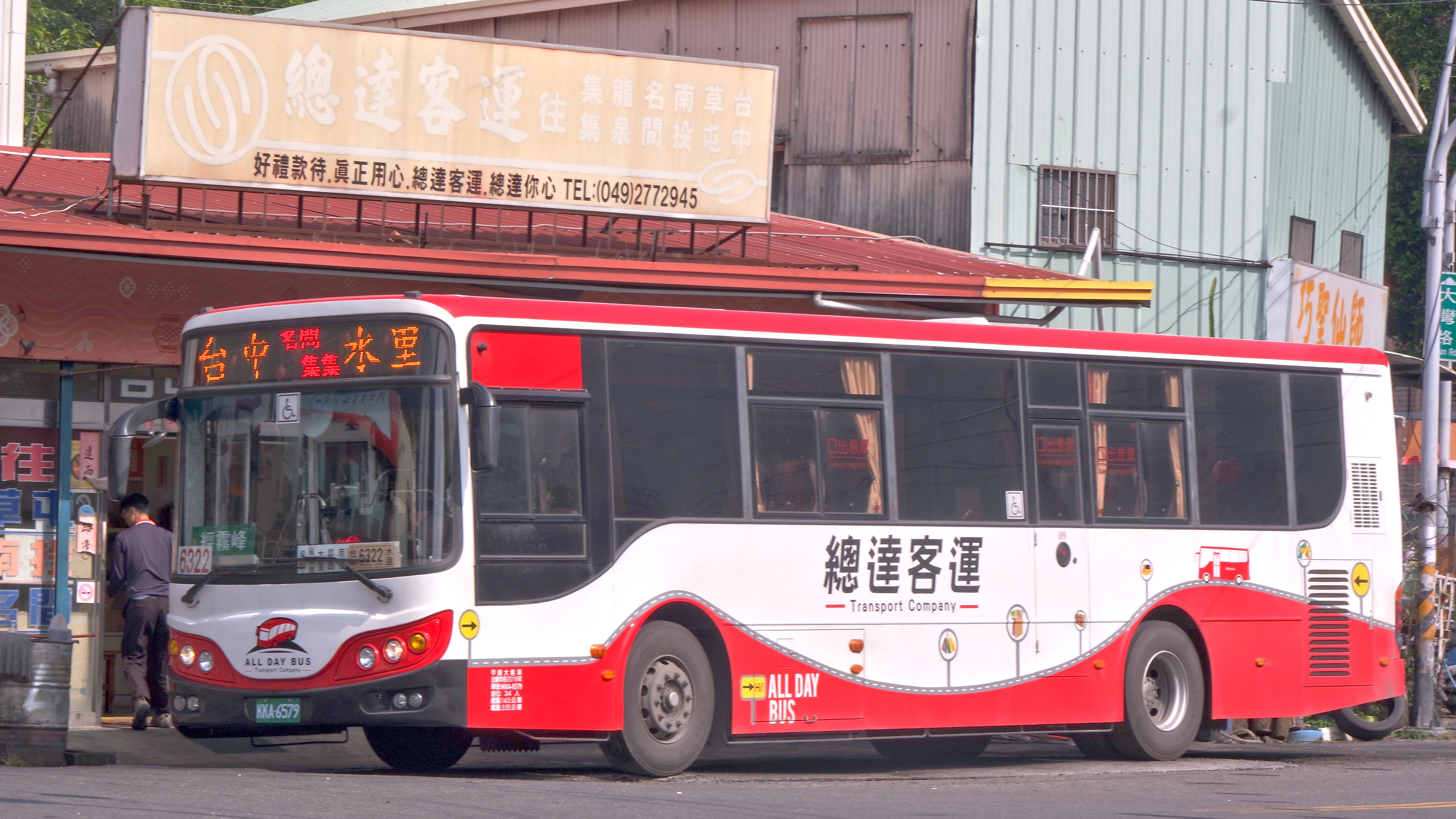 總達客運2019年日野RK8JRVA-KJF高地板巴士KKA-6579，停靠總達客運水里站。